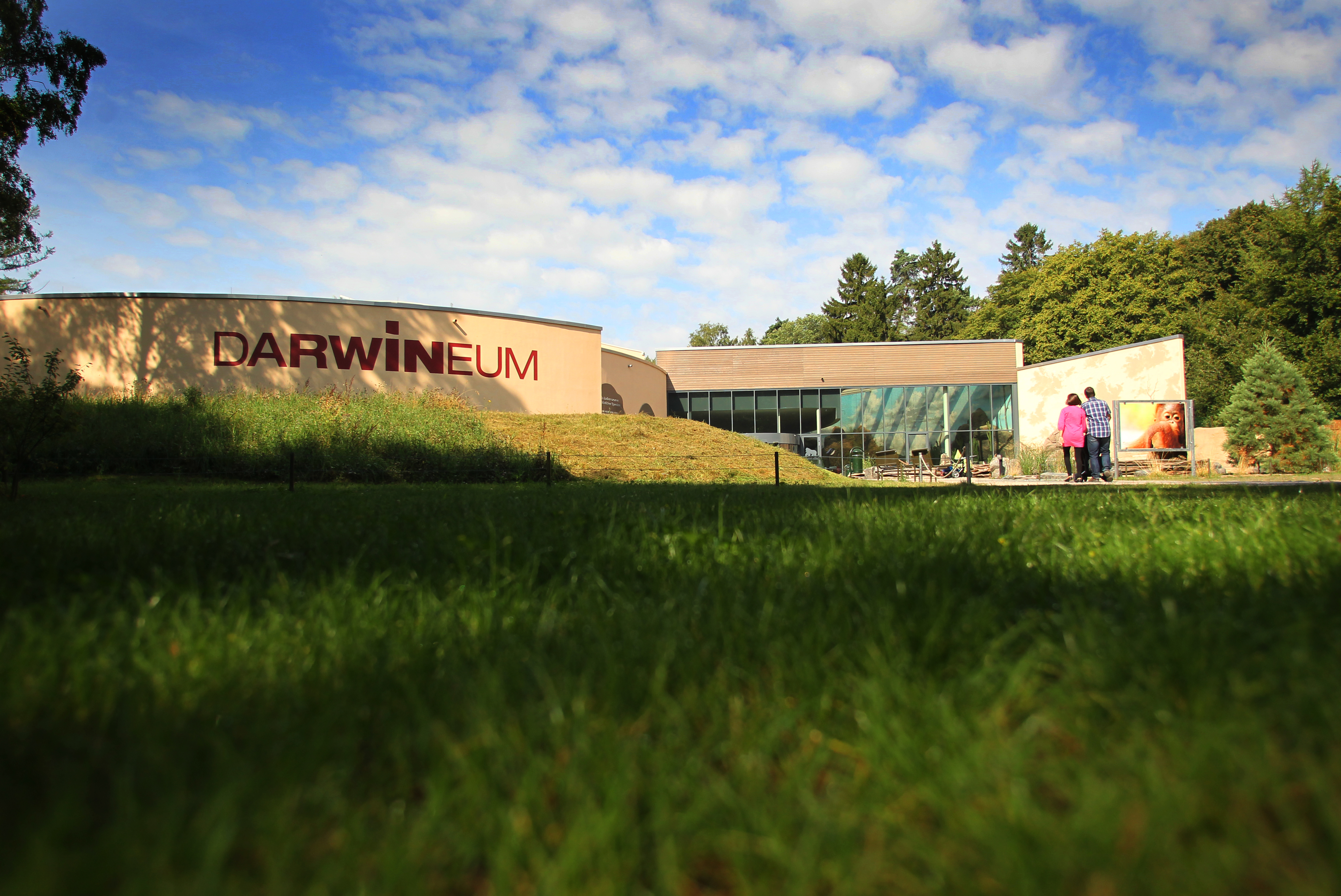 DARWINEUM